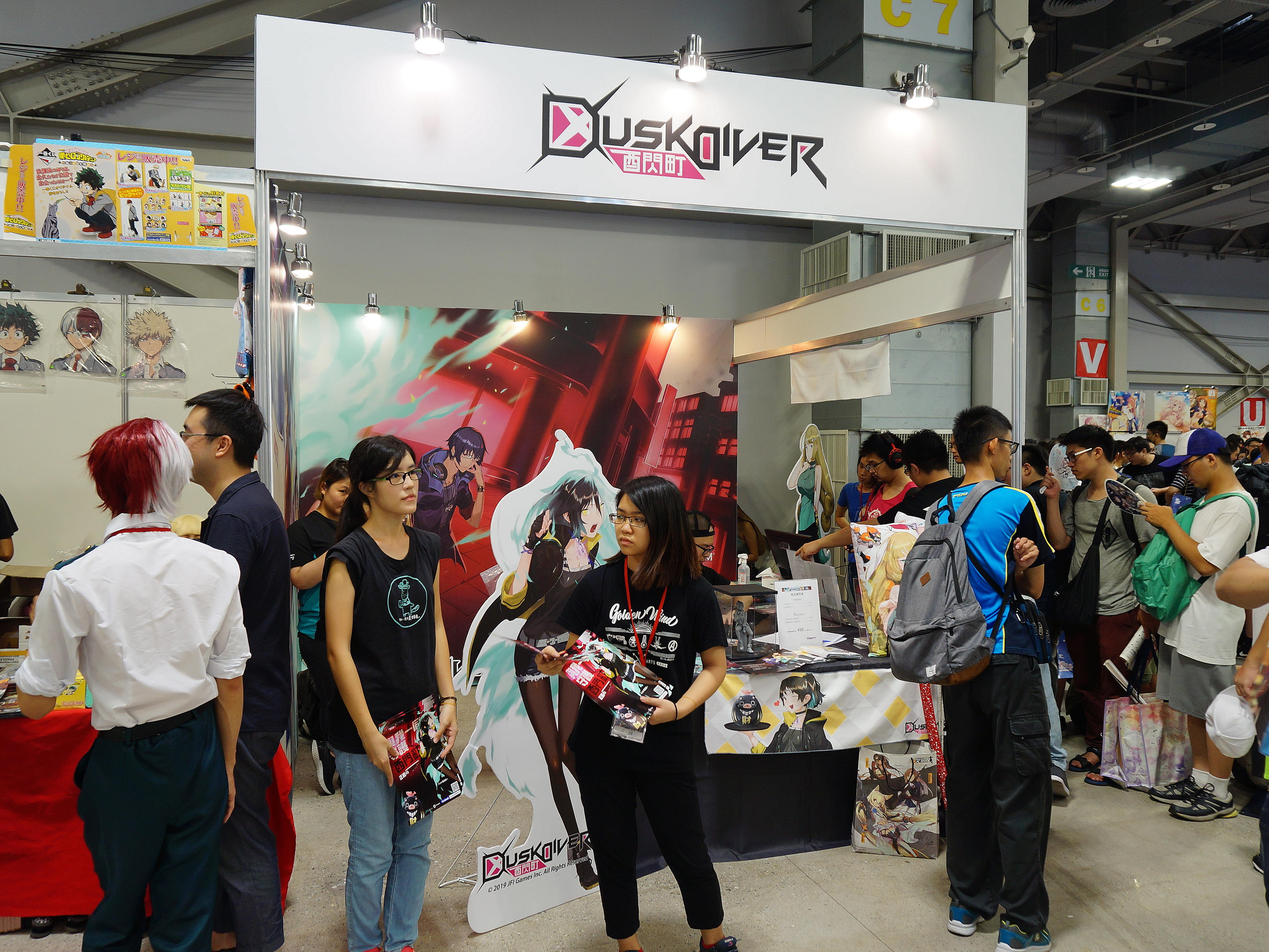 第34屆開拓動漫祭，競鋒國際《酉閃町》攤位。